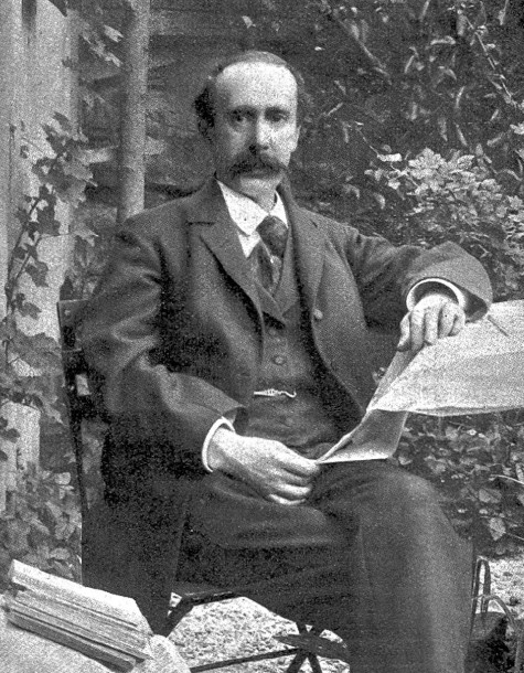 Leopold Jacoby (1840–1895) Lyriker. Fotografie von J. Meiner, Zürich